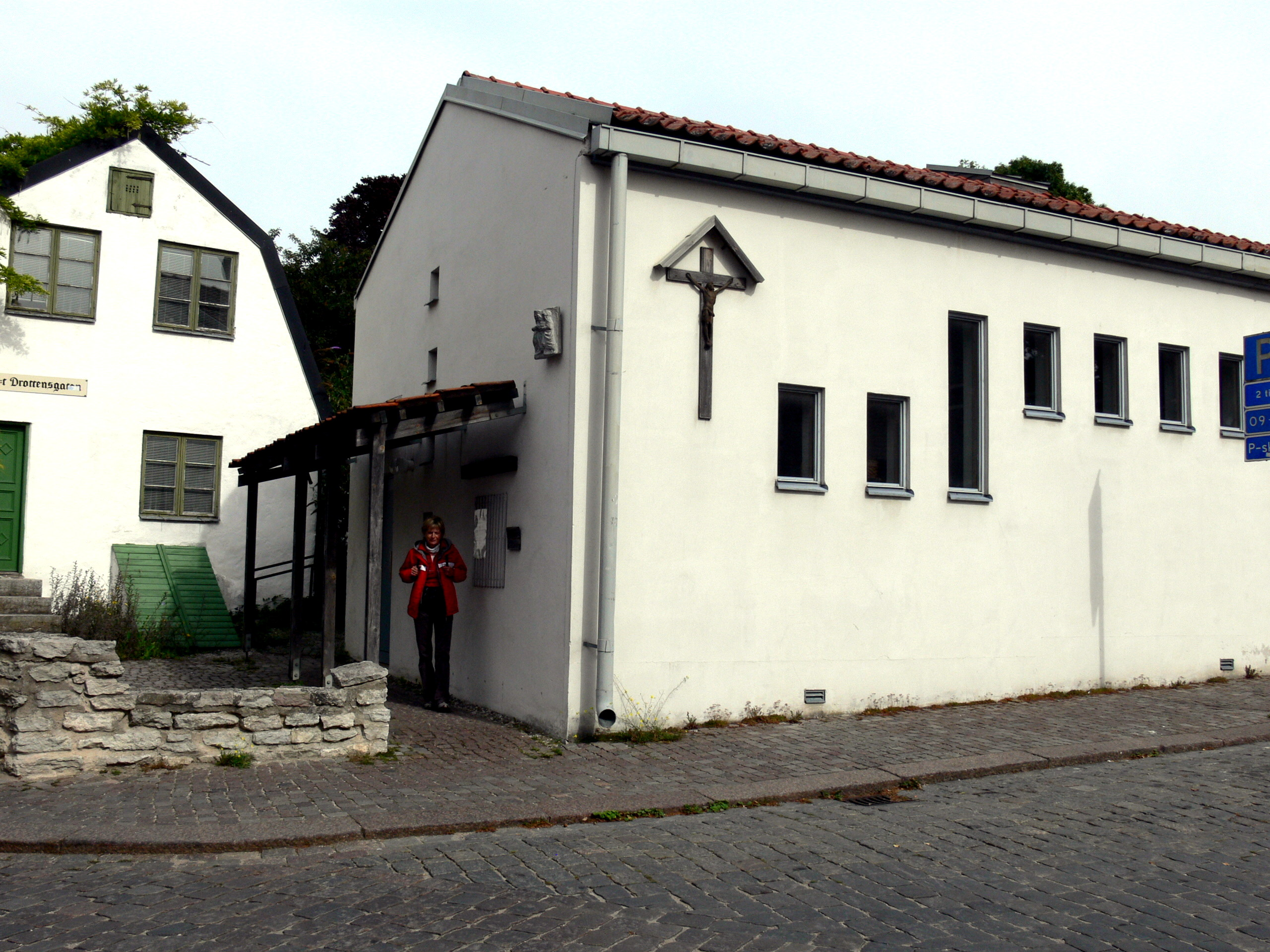 Katholische Kirche in Visby/Gotland. Außenansicht.